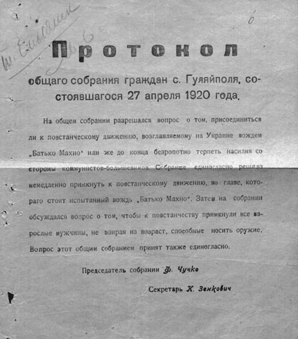 Протокол зборів громадян Гуляйполя про підтримку махновського повстанського руху, 27.04.1920.